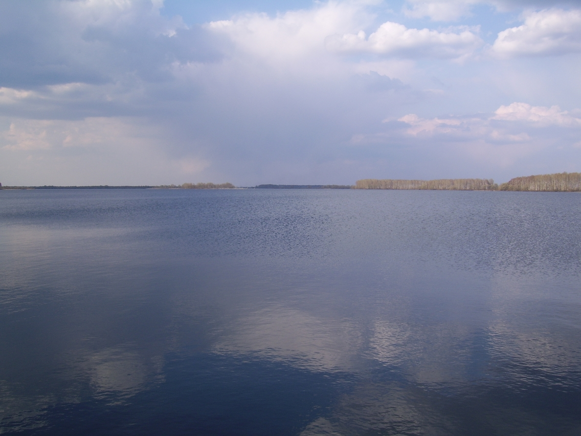 Шушпанское водохранилище Шушпанское водохранилище - расположено на реке Шушпанка и занимает площадь 530га.